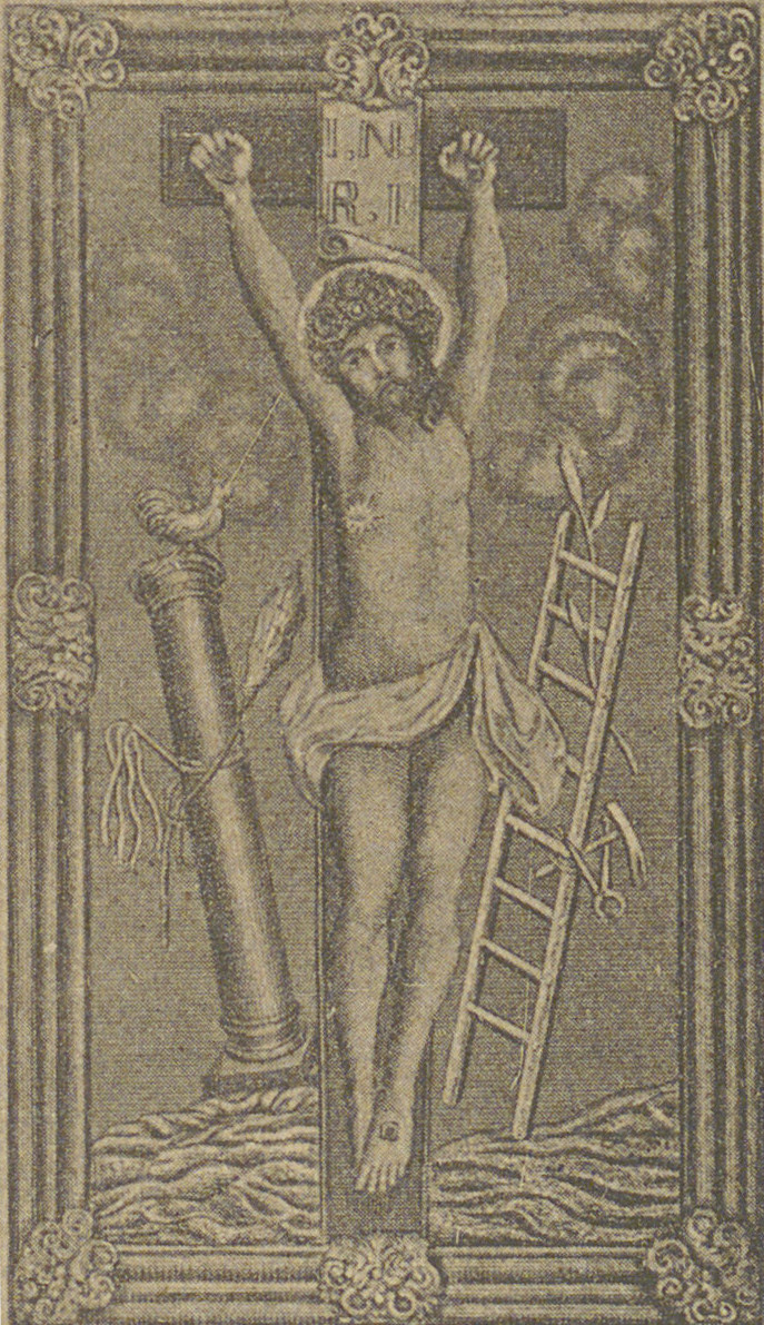 Зображення ікони з книги о. Петра Пилипця "Пам'ятка з Зарваниці"